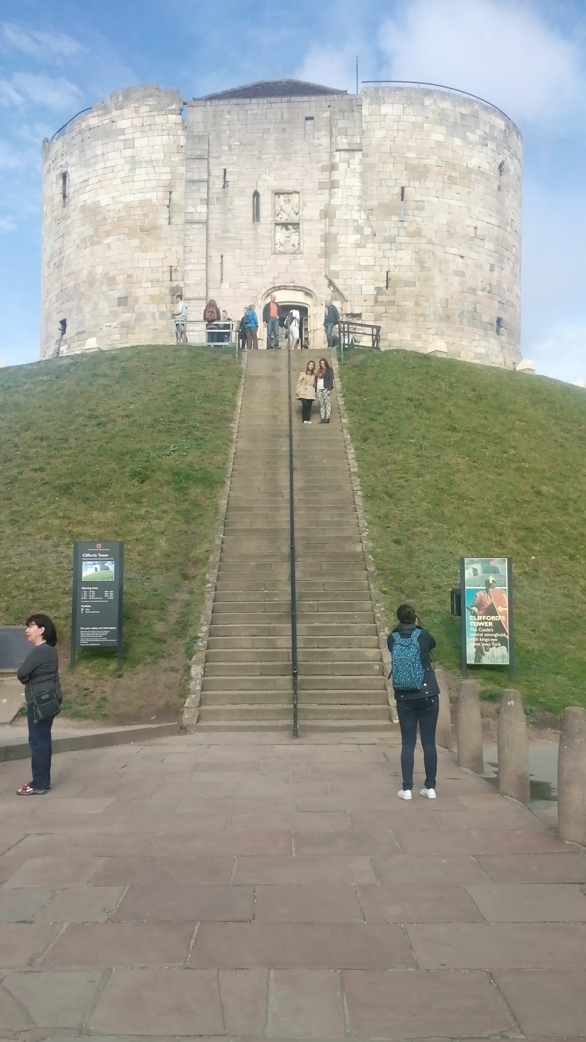 historical momument